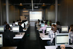 Sala de ordenadores de la Fundación FIDAS de Sevilla